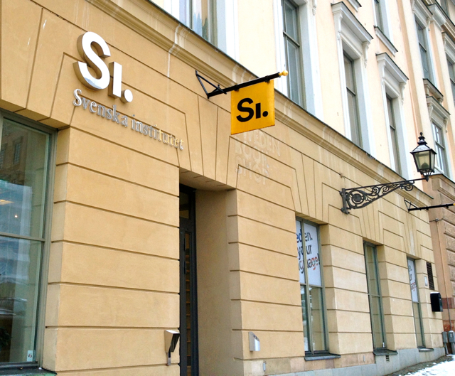 Svenska Institutets kontor på Slottsbacken 10 i Stockholm.